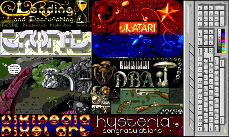 Collage d'une sélection de graphismes en pixel art “16 bits”, extraits de la scène démo de l'Atari ST (ordinateur 16/32 bits). Toutes ces images d'exemple proviennent du graphiste Jovis sur la période 1989-1994 (l'âge d'or puis la fin de cette machine). La palette est de 16 couleurs maximum (parfois moins, comme 8, 4 ou 2), parmi 512 seulement (moins que l'Amiga : 32 sur 4096). La résolution est de 320 × 200 pixels (plein écran du mode 1, sans overscan ni scrolling), où des tilesets 8 × 8 apparaissent. ~~~ Ce type de réalisations, très riche en lissage et tramage manuels, préfigurait déjà les outils d'infographie modernes (2D/3D). Les résolutions et nombres de couleurs croissants facilitèrent les conversions semi-automatiques, à partir de dessins “tradi”. À partir de 1995, les graphismes en 256 couleurs étant omniprésents, la manipulation au point par point devint trop “ingrate”. Ce qui fit délaisser les techniques manuelles de pixel art, pour leur préférer celles adaptées aux créations 32-bit actuelles. ~~~ Seules les figures imposées les plus graphiques sont représentatives ici de la scène démo : “fontes”, logos, sprites et fonds. La performance des effets codés (vitesse, nombre, variété…) aura longtemps profité des limitations constitutives du pixel art. ~~~ dpla [composite 104 couleurs + historique 127 colonnes].